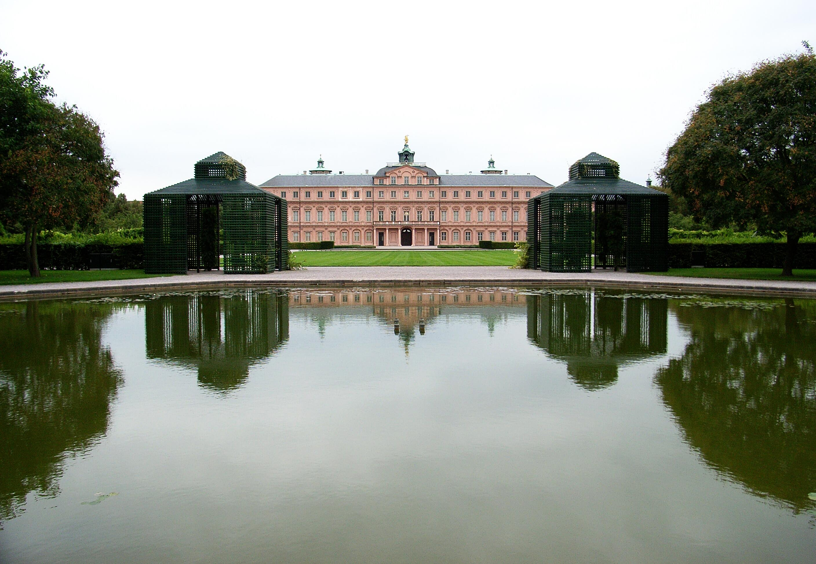 Dieses Bild zeigt das Rastatter Schloss vom Schlosspark.